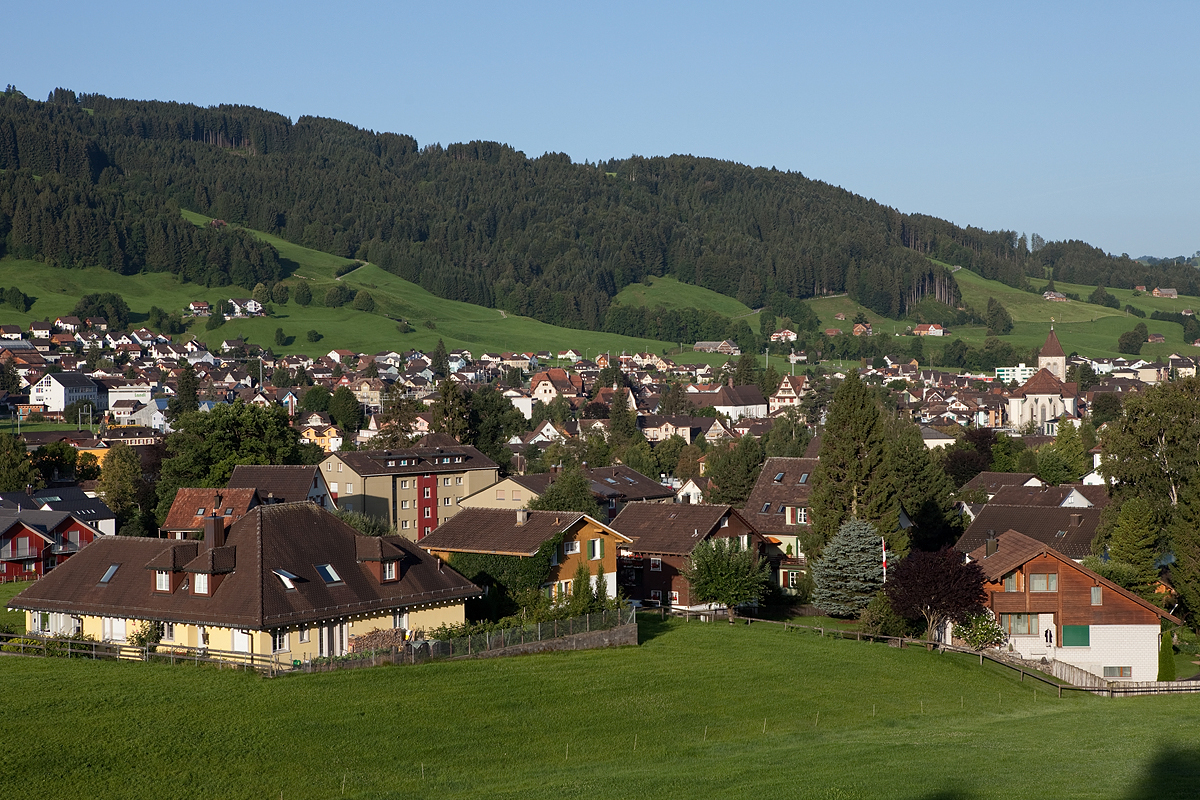 Appenzell (AI)